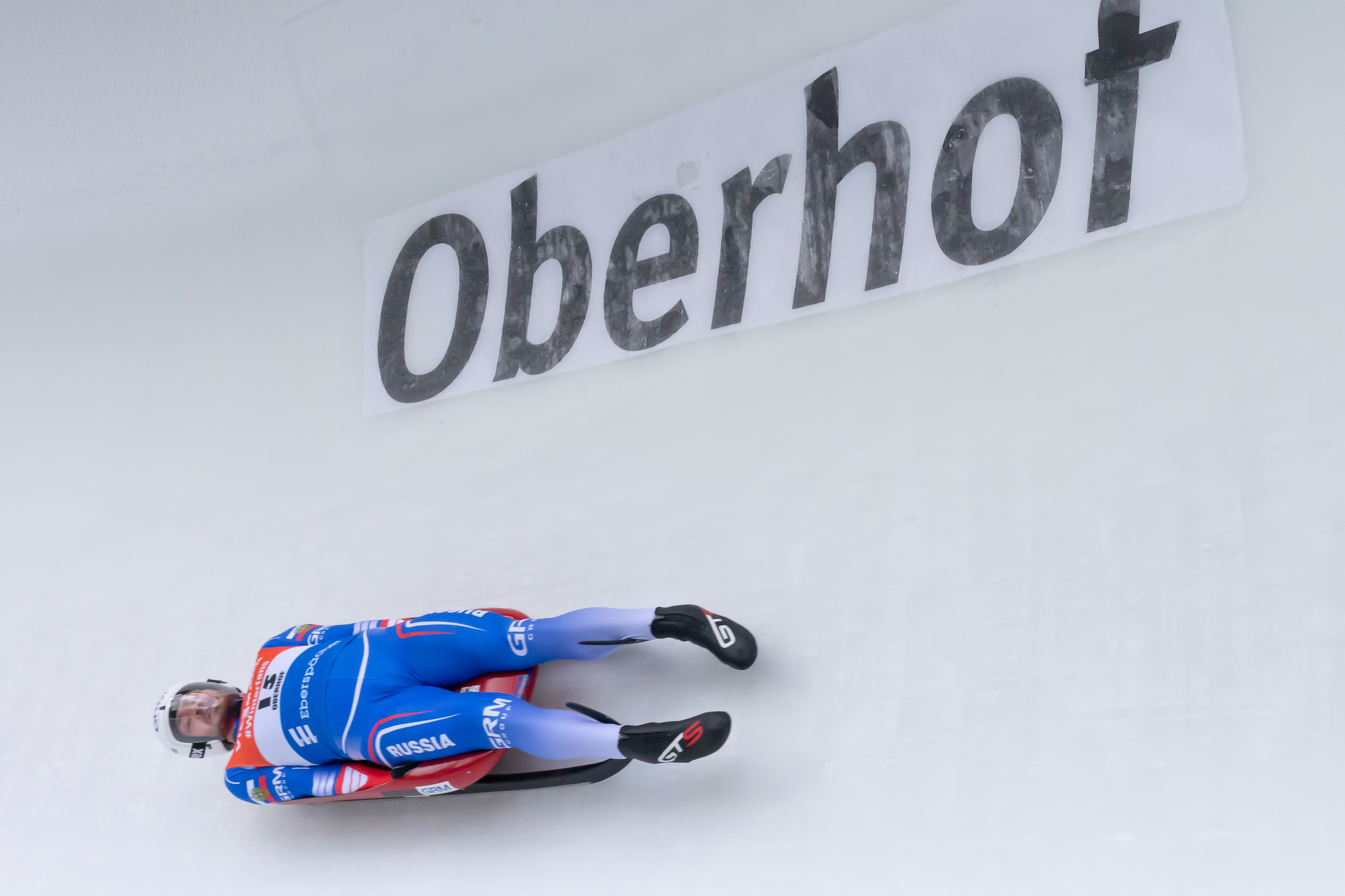 Viessmann Luge World Cup Oberhof; Maksim Aravin (RUS, Russland) während der Fahrt